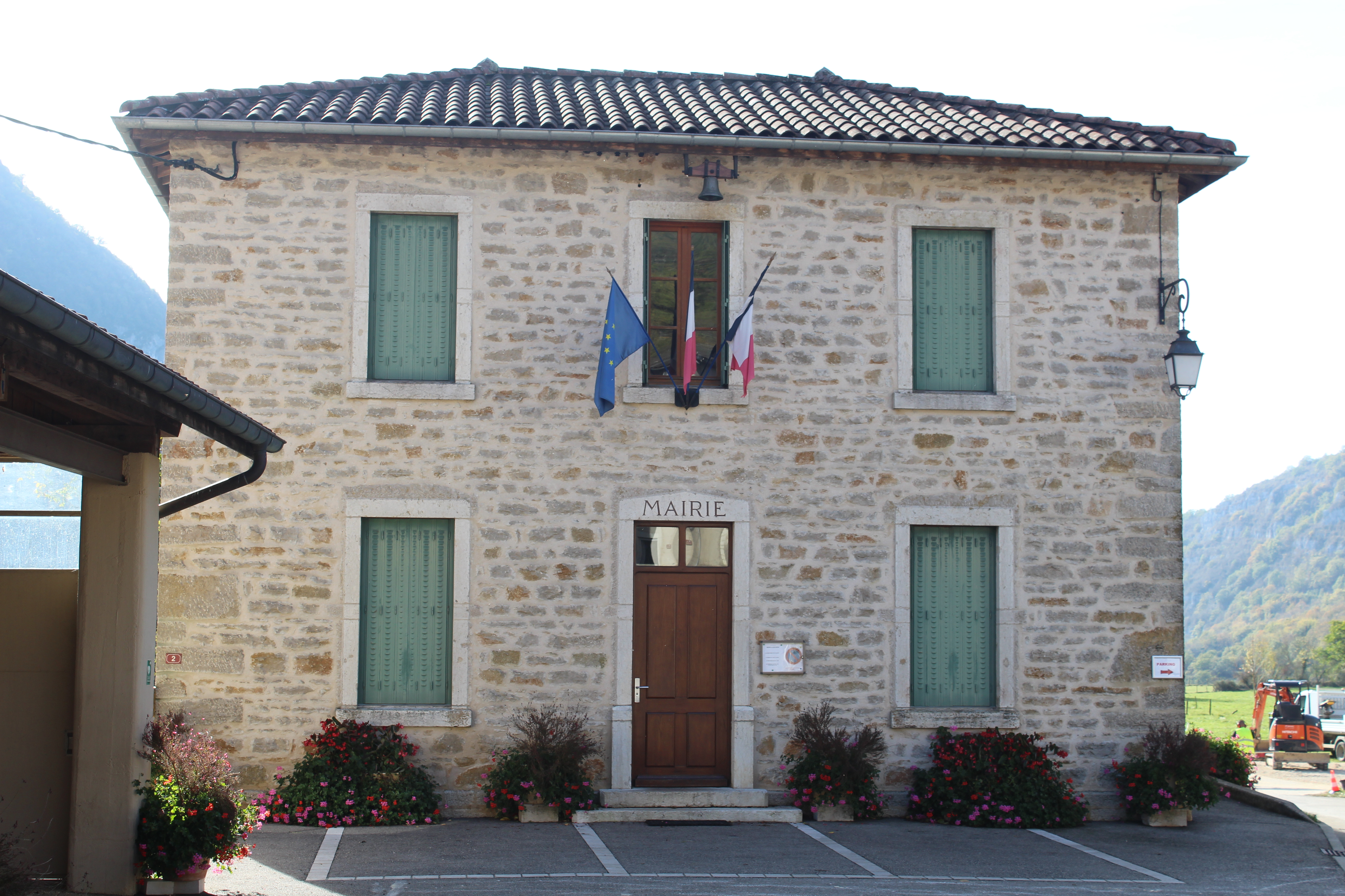 Mairie de Bolozon.